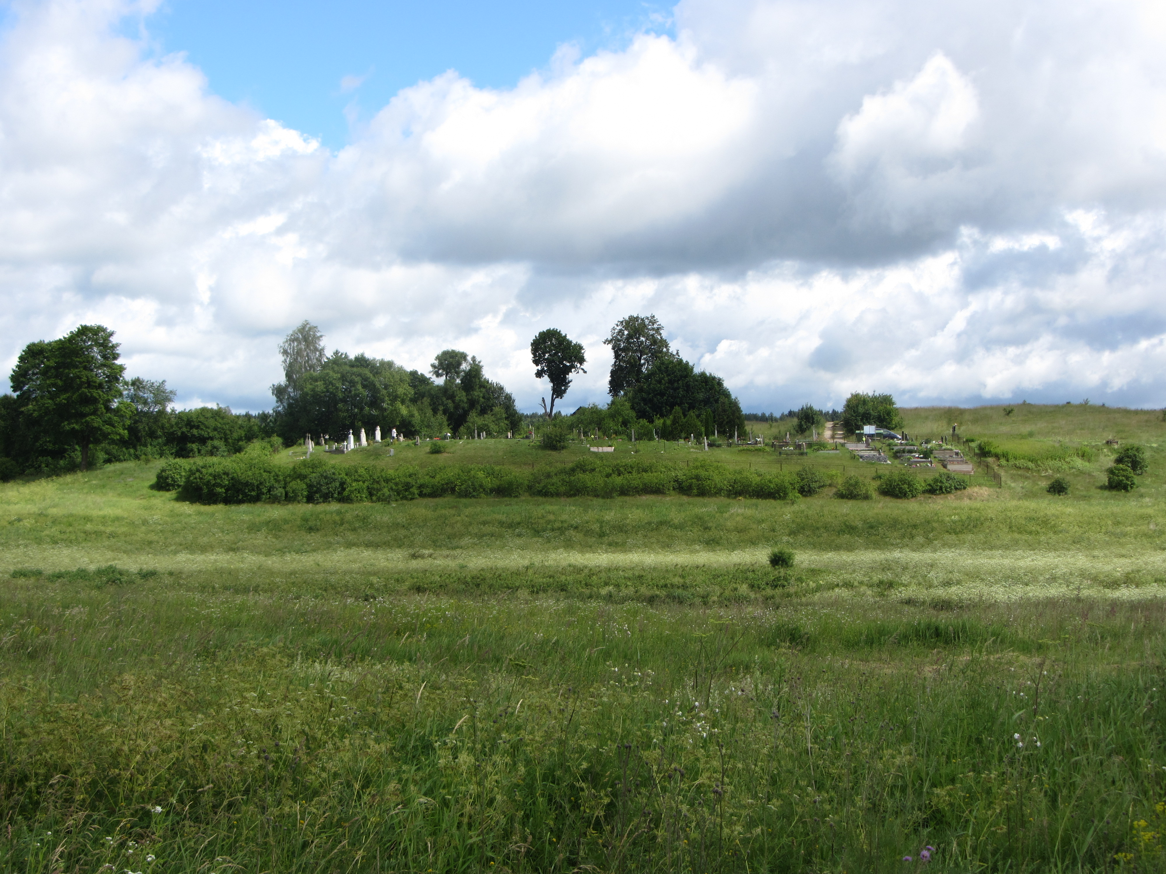 Vaivadiškės, Lithuania